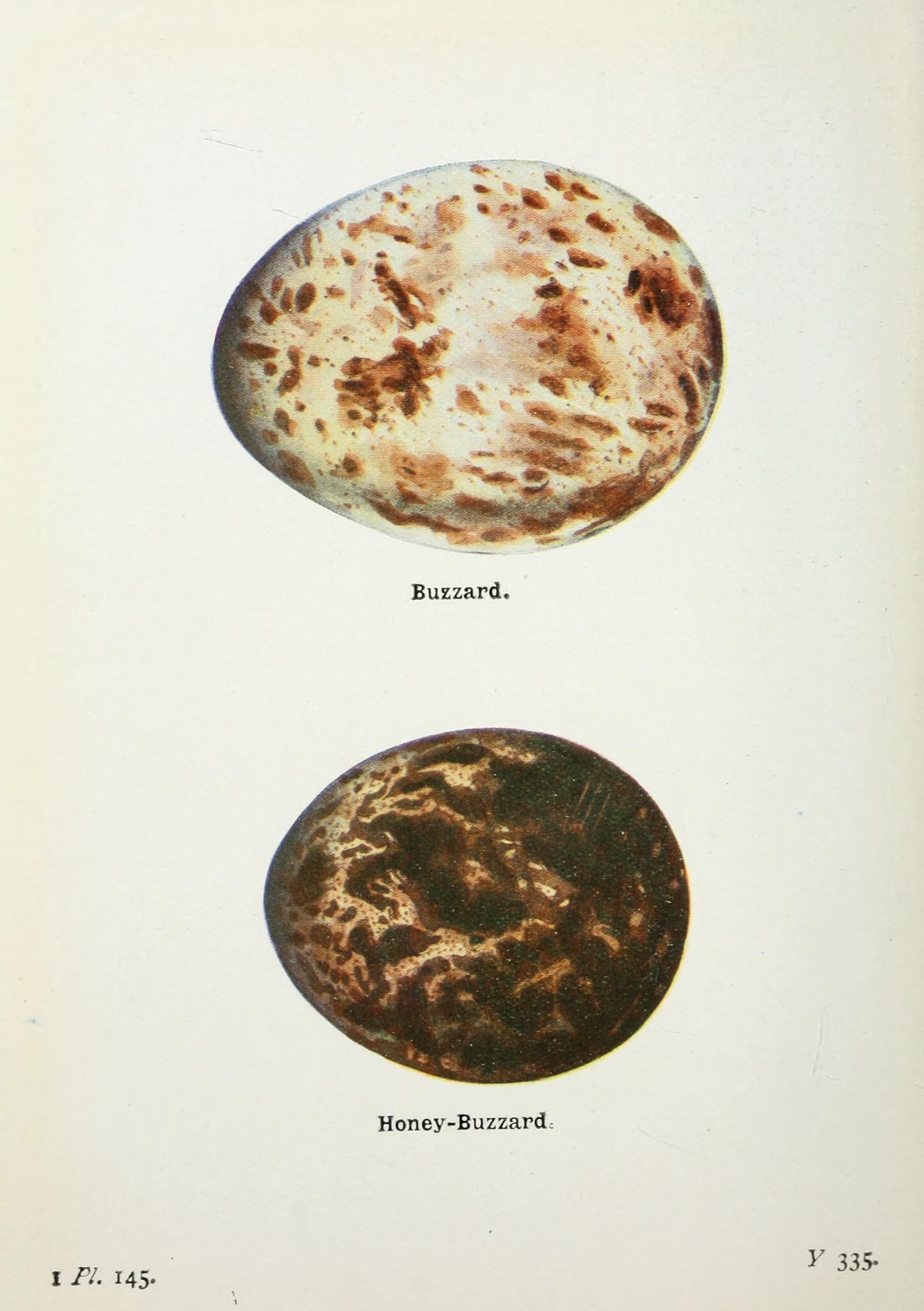 Buzzard. ^?-m- ^^^ Honey-Buzzardc I /'/. 145- y 335